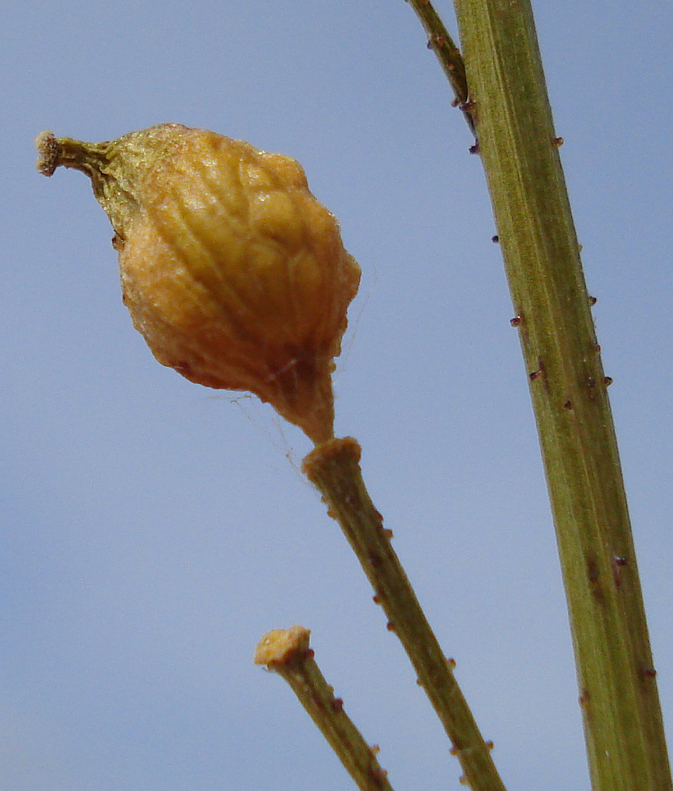 Bunias orientalis (reifes Schötchen)